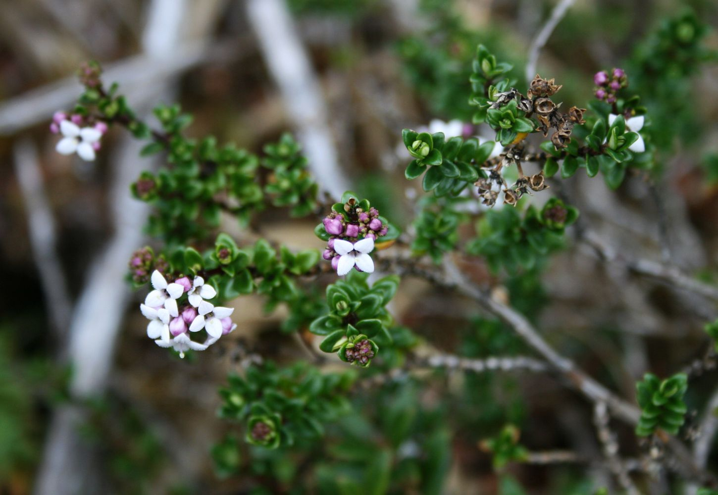 Arcytophyllum lavarum, Kaffeegewächse (Rubiaceae) - Costa Rica: Prov. Cartago, Cordillera de Talamanca, Fahrweg E Carretera Interamericana, N Cerro Sákira, ca. 3250 m